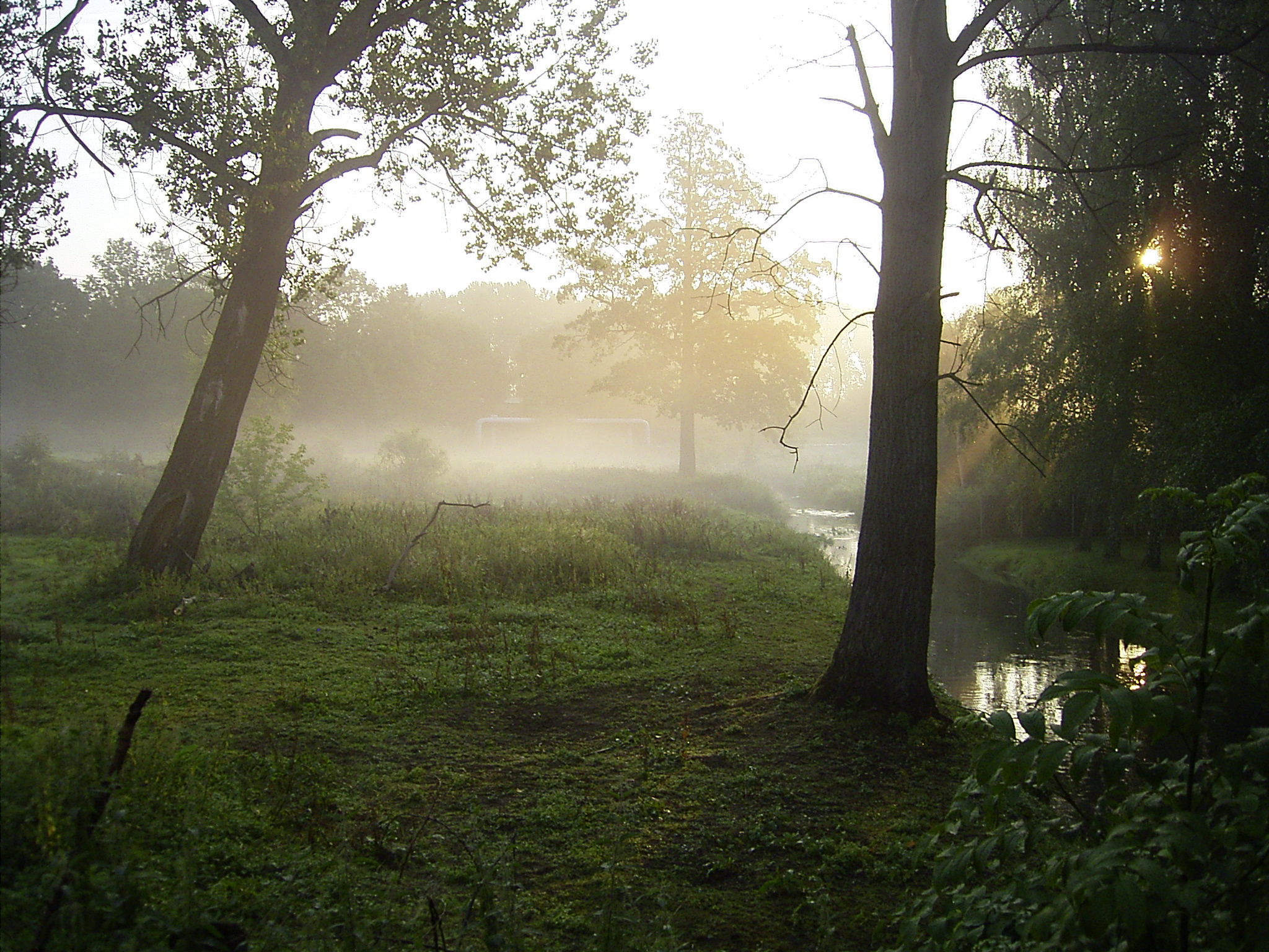 Parthenaue in Abtnaundorf (Leipzig)